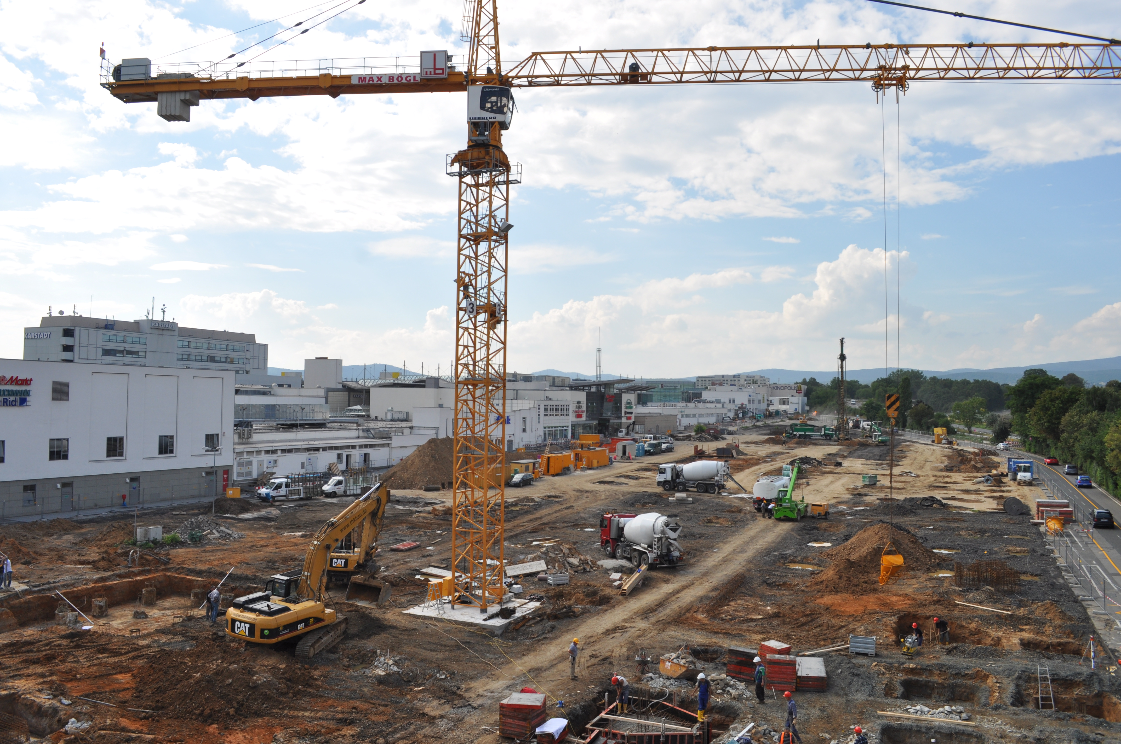 Großbaustelle Erweiterung des Main-Taunus-Zentrums, Blick vom alten Parkhaus Richtung Norden